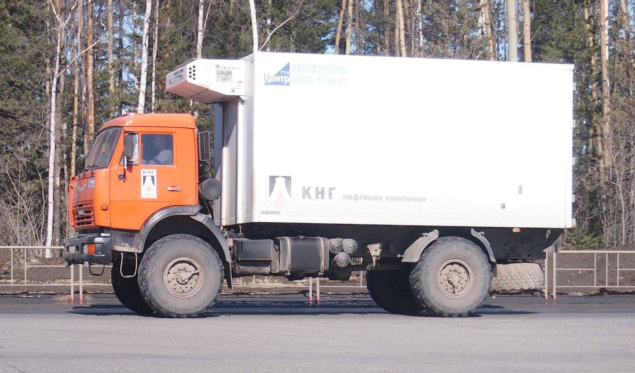 КАМАЗ-4326 Ханты-Мансийск